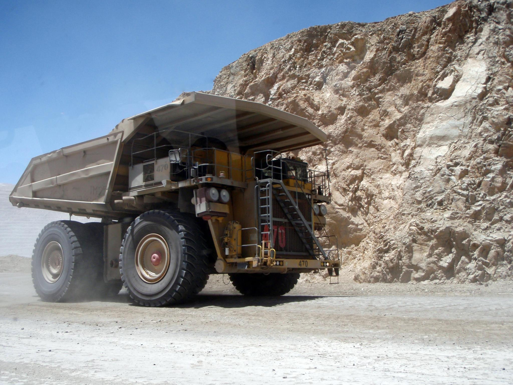 Camión en Chuquicamata.